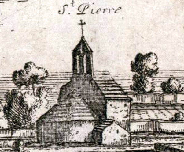 Vue d’Arles en 1660 (détail). Eglise Saint-Pierre de Trinquetaille, dite de Saint-Pierre-le-Vieux (ou Saint-Pierre-de-Gallègue), démolie en 1786.